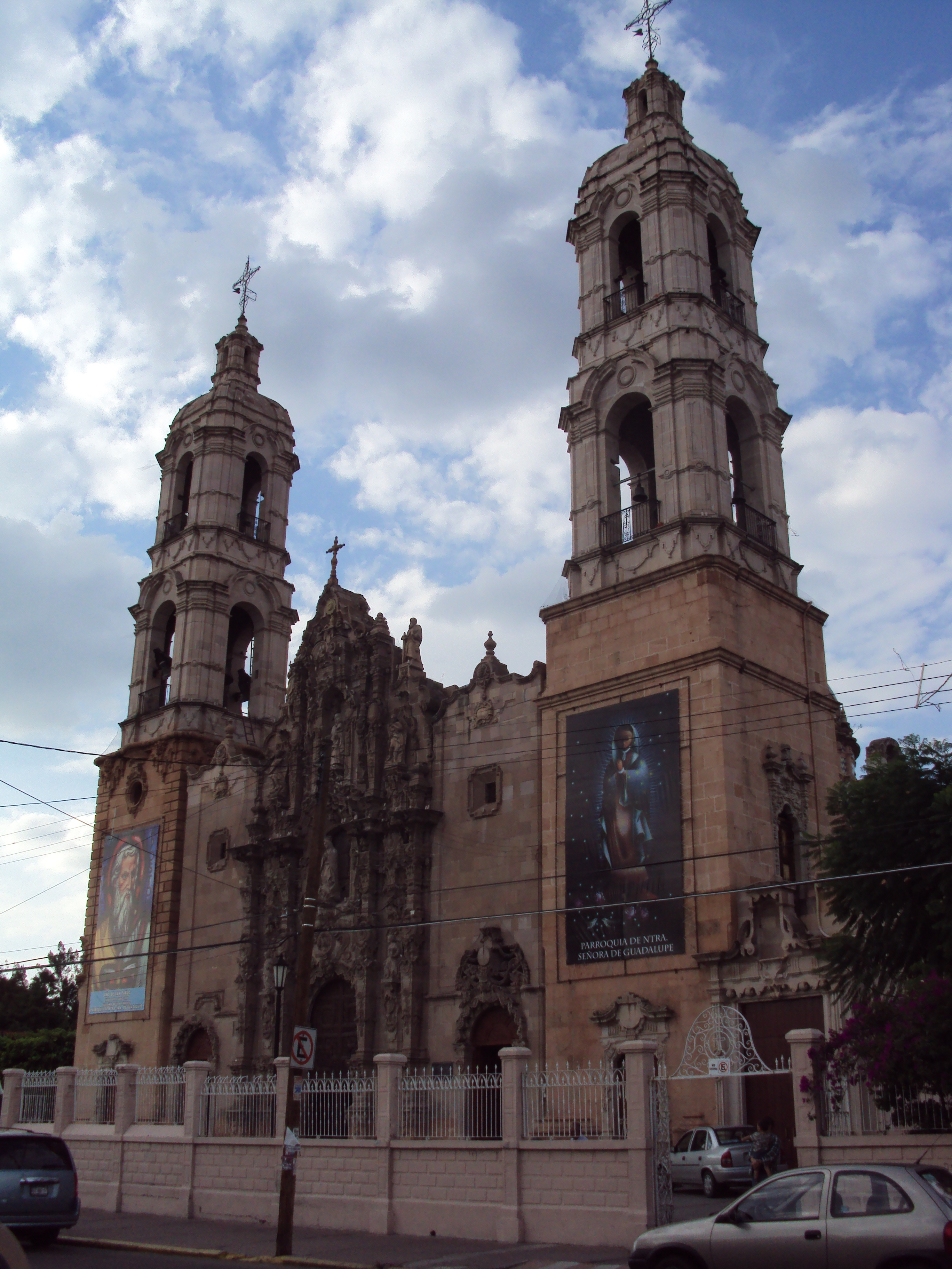 Templo de Guadalupe, Aguascalientes, México